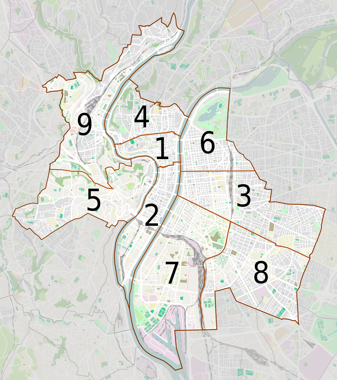 Carte de la ville de Lyon avec les numéros d'arrondissements.